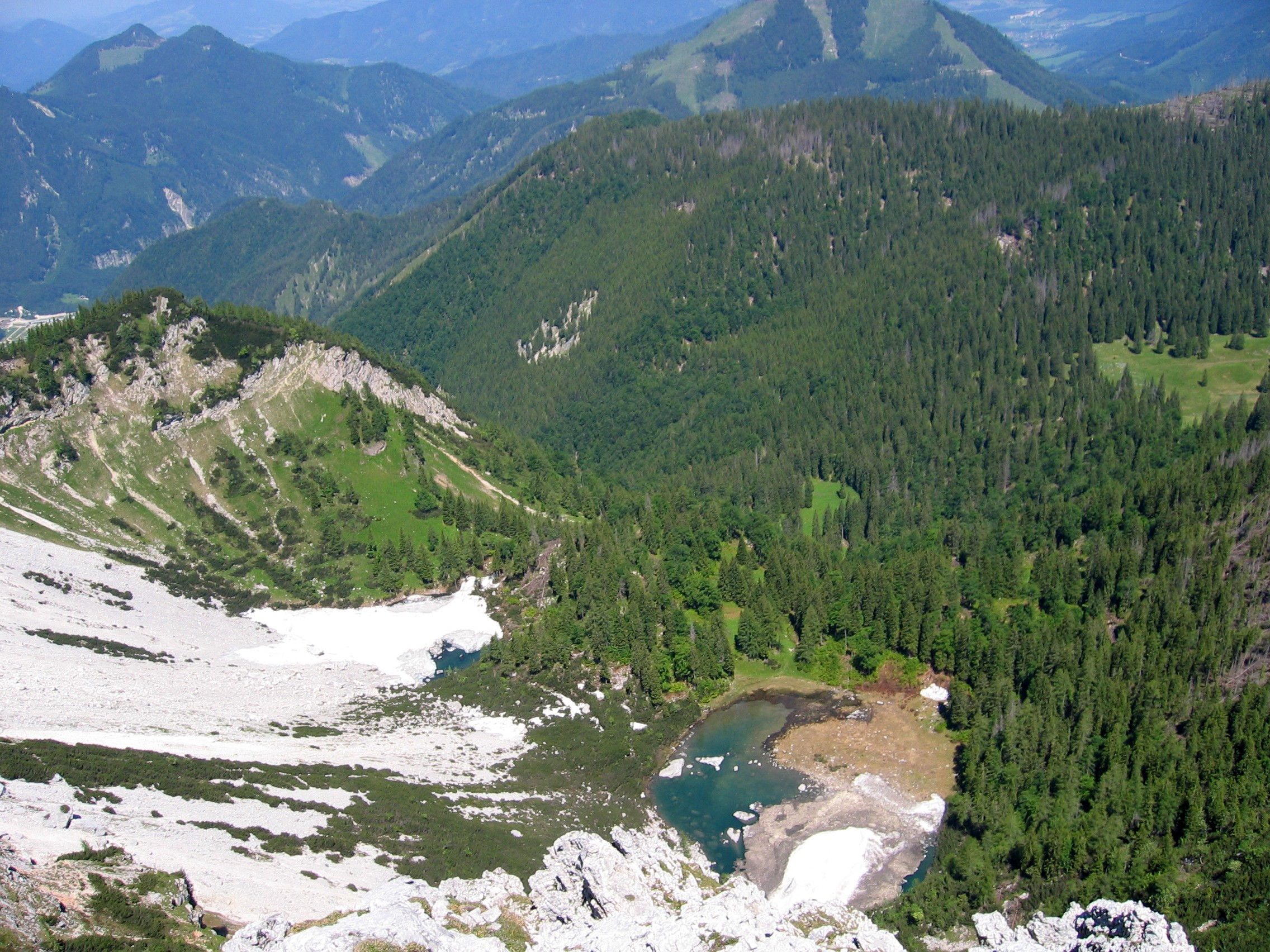 Feichtauer Seen, Nationalpark Kalkalpen This file shows the National Park Kalkalpen in Austria.